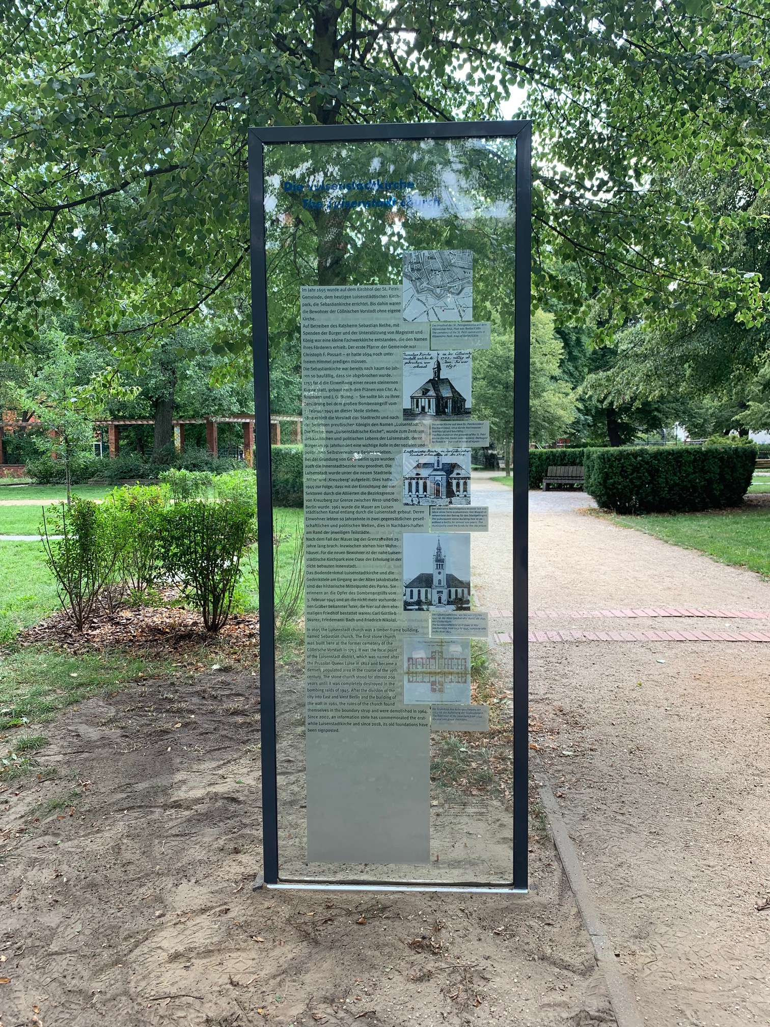 Am 16. August 2019 wurde eine neue Gedenktafel mit der Geschichte der Luisenstadt-Kirche eingeweiht